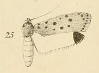 Ethmia oculigera